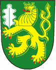 znak obce